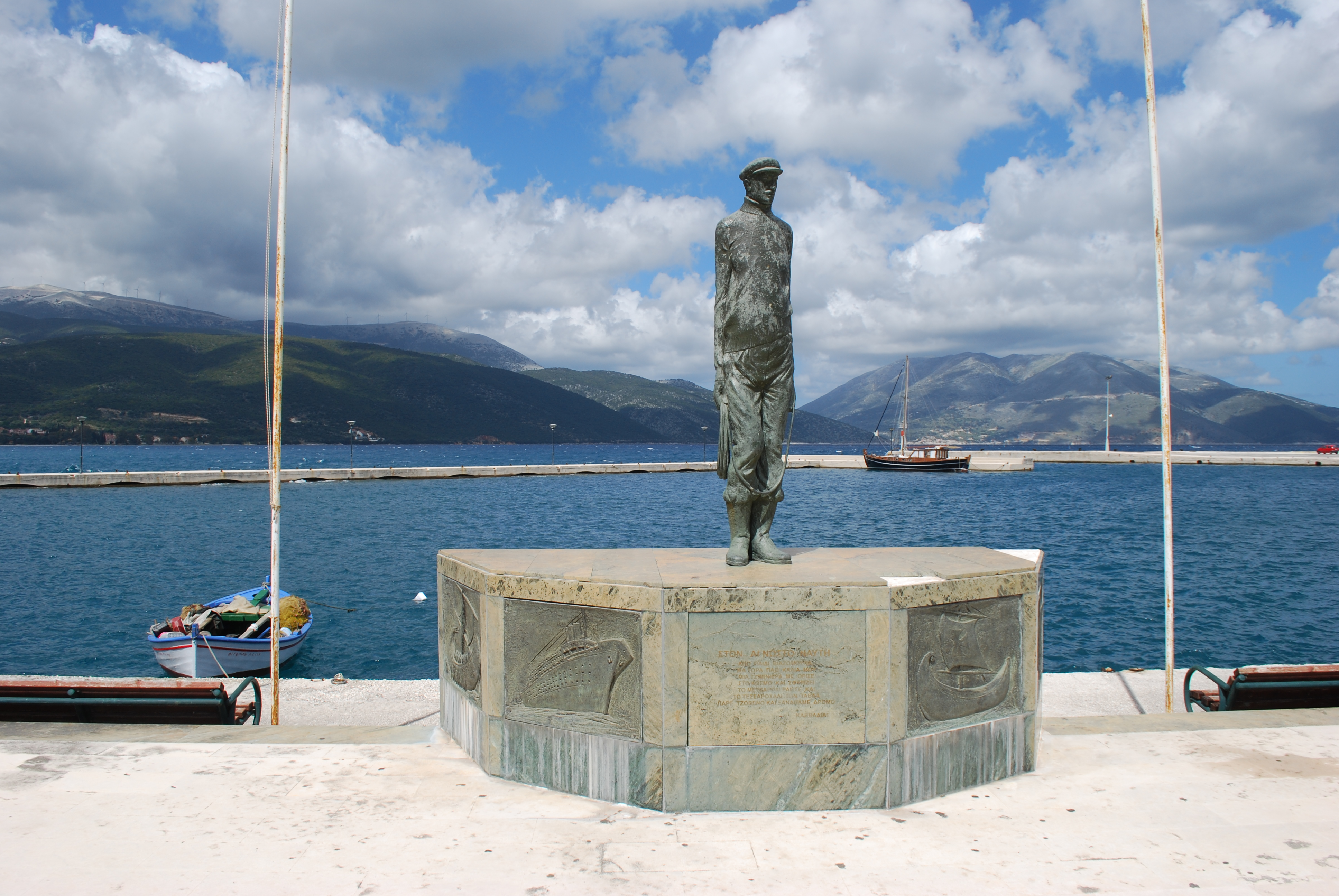 Vue de Sami (Kefalonia).